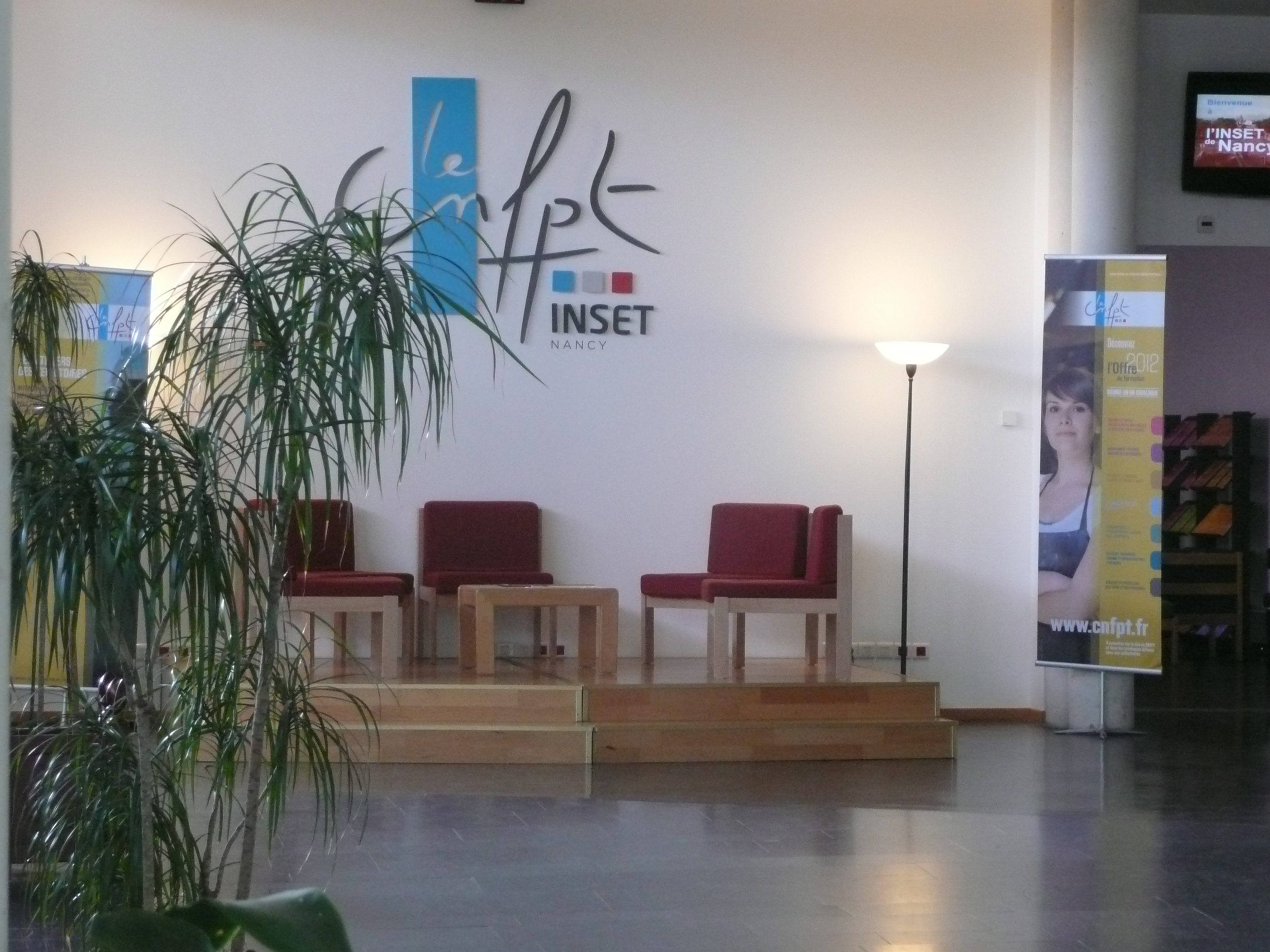 Hall d'entrée de l'INSET de Nancy